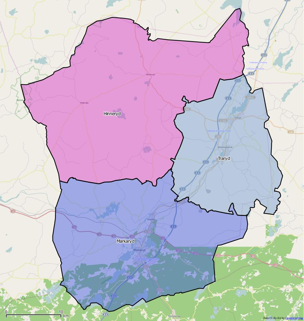 Distriktsindelningen i Markaryds kommun World file: 57.18102325070449155 0 0 -57.18102325070449155 1487642.02564526861533523 7695960.54081140272319317